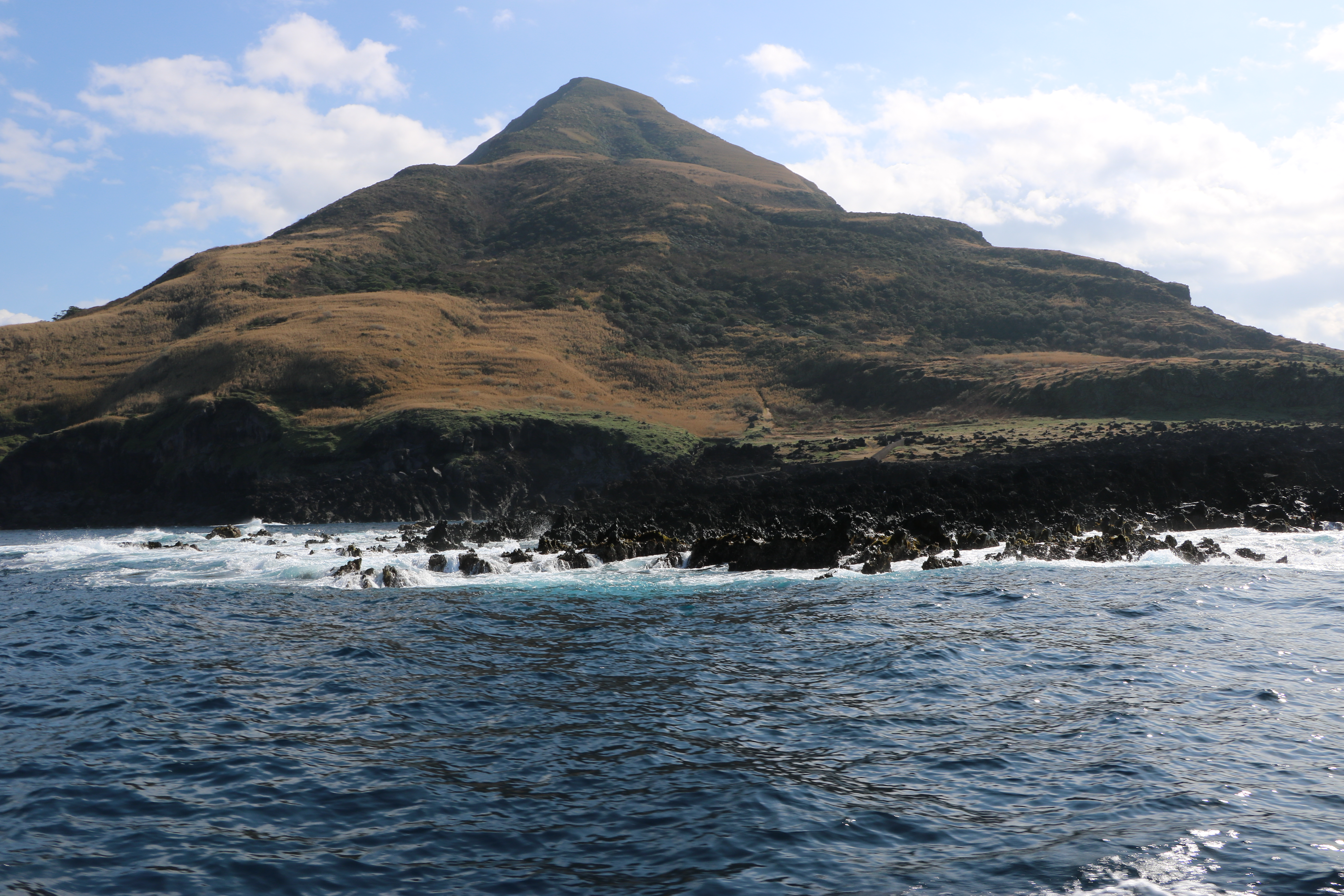 八丈小島鳥打地区熔岩地帯を海上から望む（東京都八丈町）